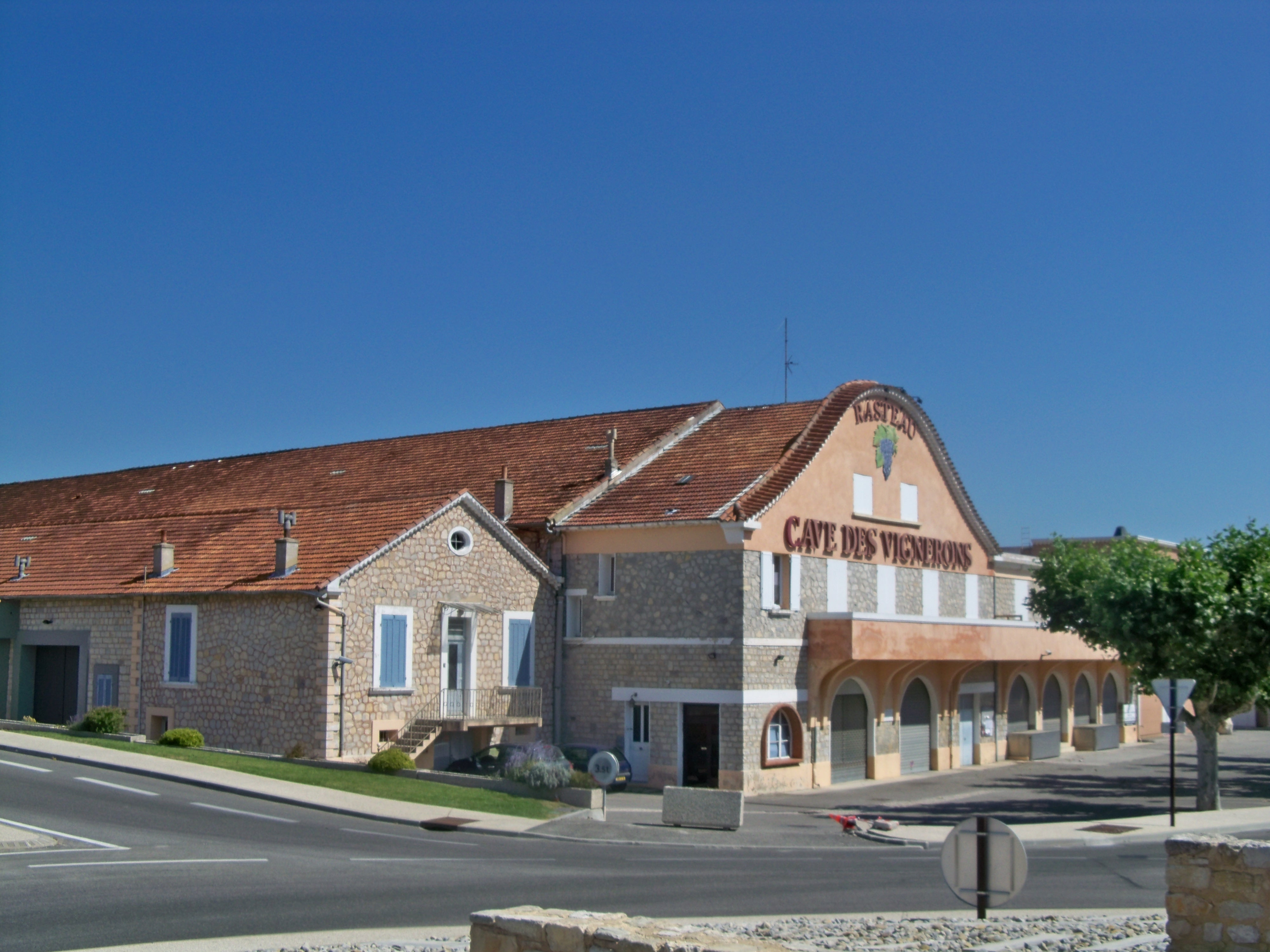 Cave des vignerons de Rateau, Vaucluse, France